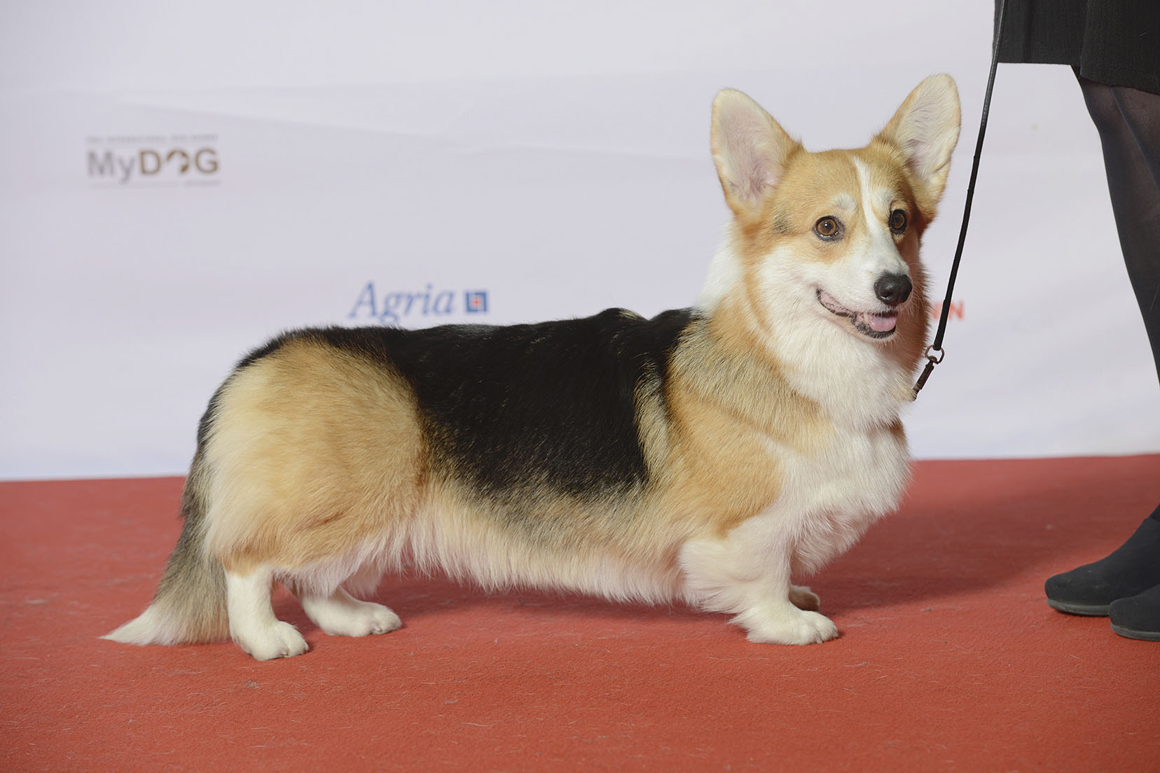 Grupp 1, WELSH CORGI PEMBROKE, BE CH C.I.B. LU CN NL CH Siggen’s Marguerita MyDOG, nordens största hundevenemang.